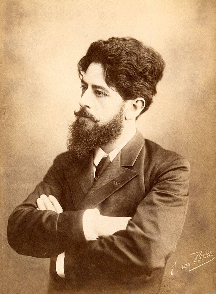 Alexandru Ciurcu, fotografie pe hartie albuminata, format cabinet. Biblioteca Academiei Romane, Cabinetul de Stampe.